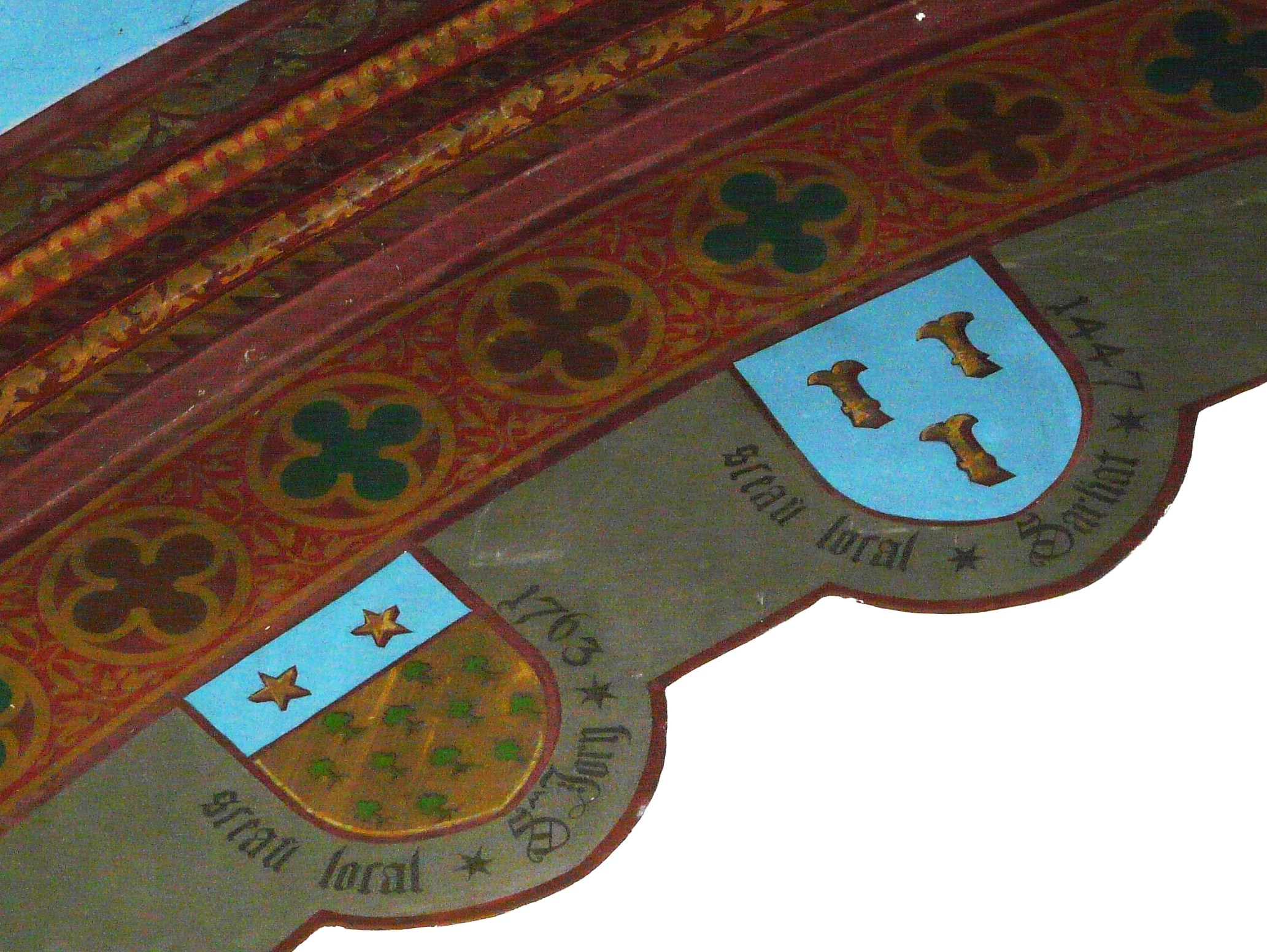 Peinture du chœur de l'église Saint-Martin, Savignac-les-Églises, Dordogne, France. Représentation du sceau local de Saint Jory (à gauche en 1763) et de celui de Sarliac (à droite en 1447)